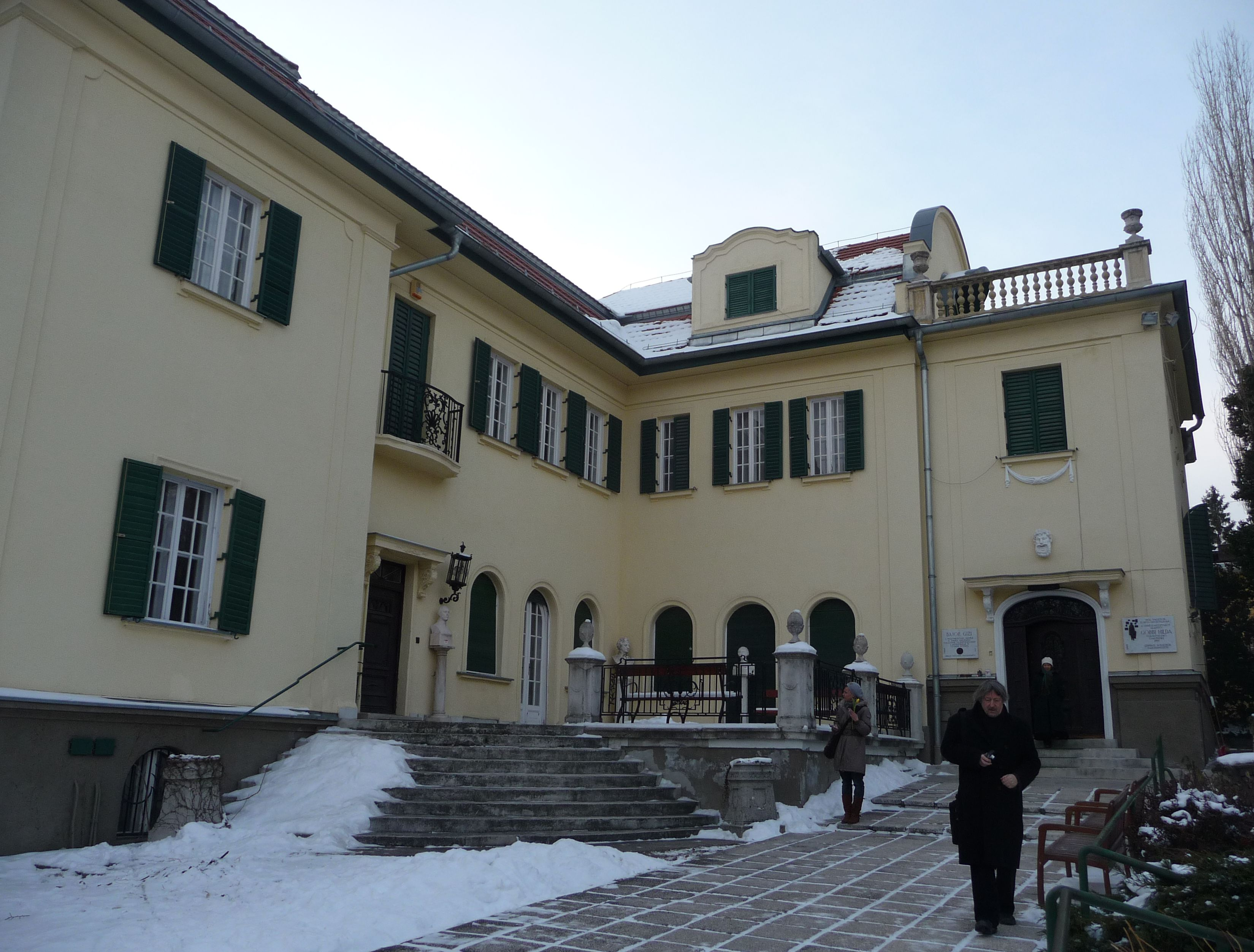 Bajor Gizi egykori villája. Jelenleg Bajor Gizi Színészmúzeum Budapest, Budapest, XII. Stromfeld Aurél út 16